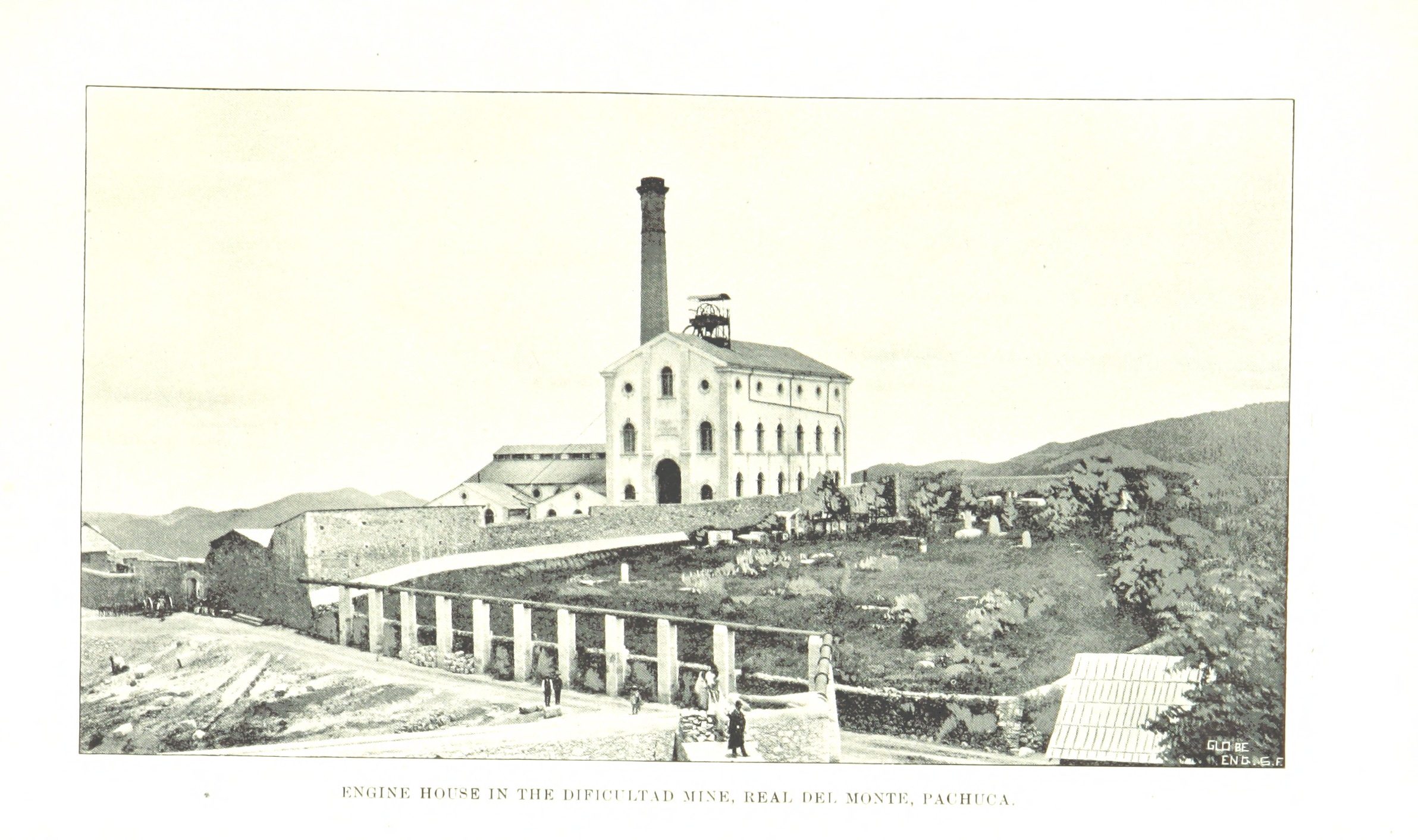 Image taken from: Title: "Resources and Development of Mexico. [With plates.]" Author: BANCROFT, Hubert Howe. Shelfmark: "British Library HMNTS 10480.dd.38." Page: 193 Place of Publishing: San Francisco Date of Publishing: 1893 Publisher: Bancroft Co. Issuance: monographic Identifier: 000188899 Explore: Find this item in the British Library catalogue, 'Explore'. Download the PDF for this book (volume: 0) Image found on book scan 193 (NB not necessarily a page number) Download the OCR-derived text for this volume: (plain text) or (json) Click here to see all the illustrations in this book and click here to browse other illustrations published in books in the same year. Order a higher quality version from here.